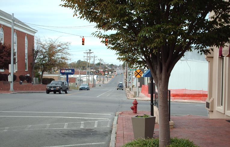 Zdjęcie Głównej ulicy